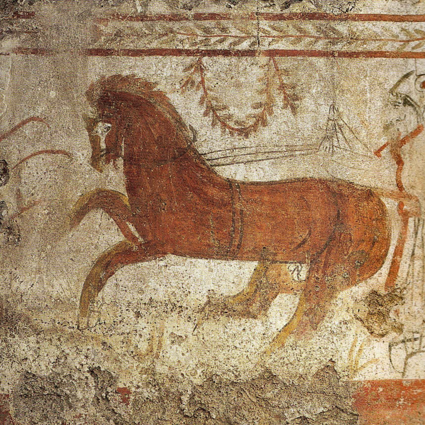 Paestum, Grab des heimkehrenden Ritters. Seitenplatte, vorderes Gespann der Wagenrennenszene